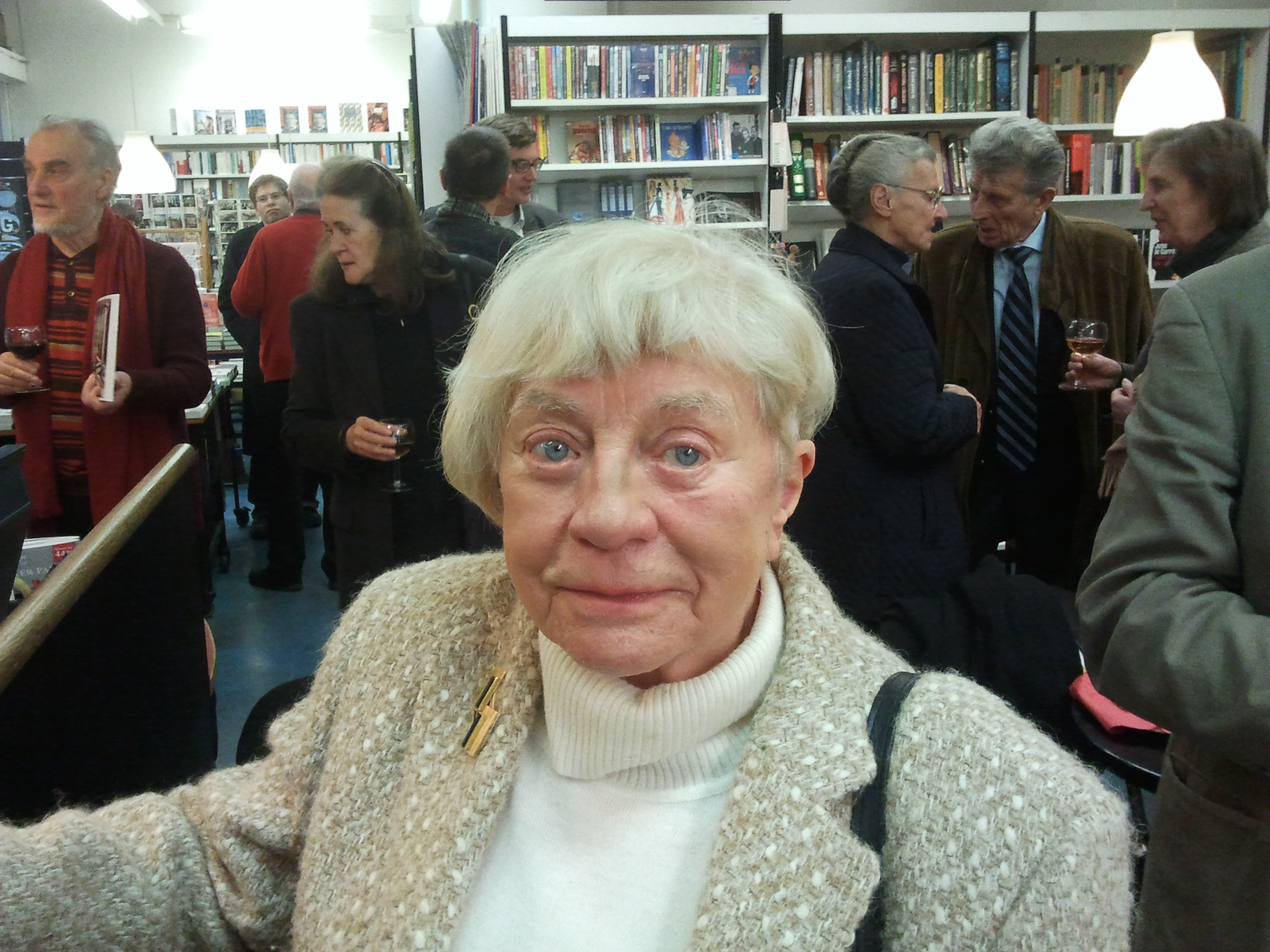 Die Malerin Rita Preuss während einer Ausstellungseröffnung in den Räumen der Büchergilde Gutenberg, Berlin.